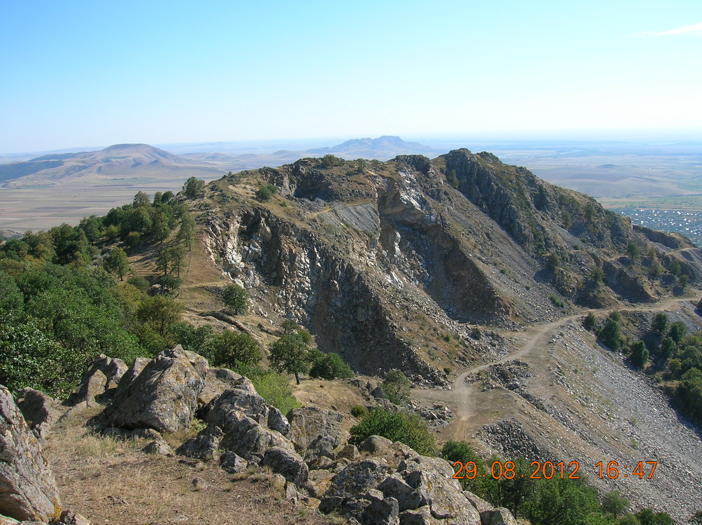 Parcul Naţional Munţii Măcinului, Vârful Ghiunaltu (442 m)